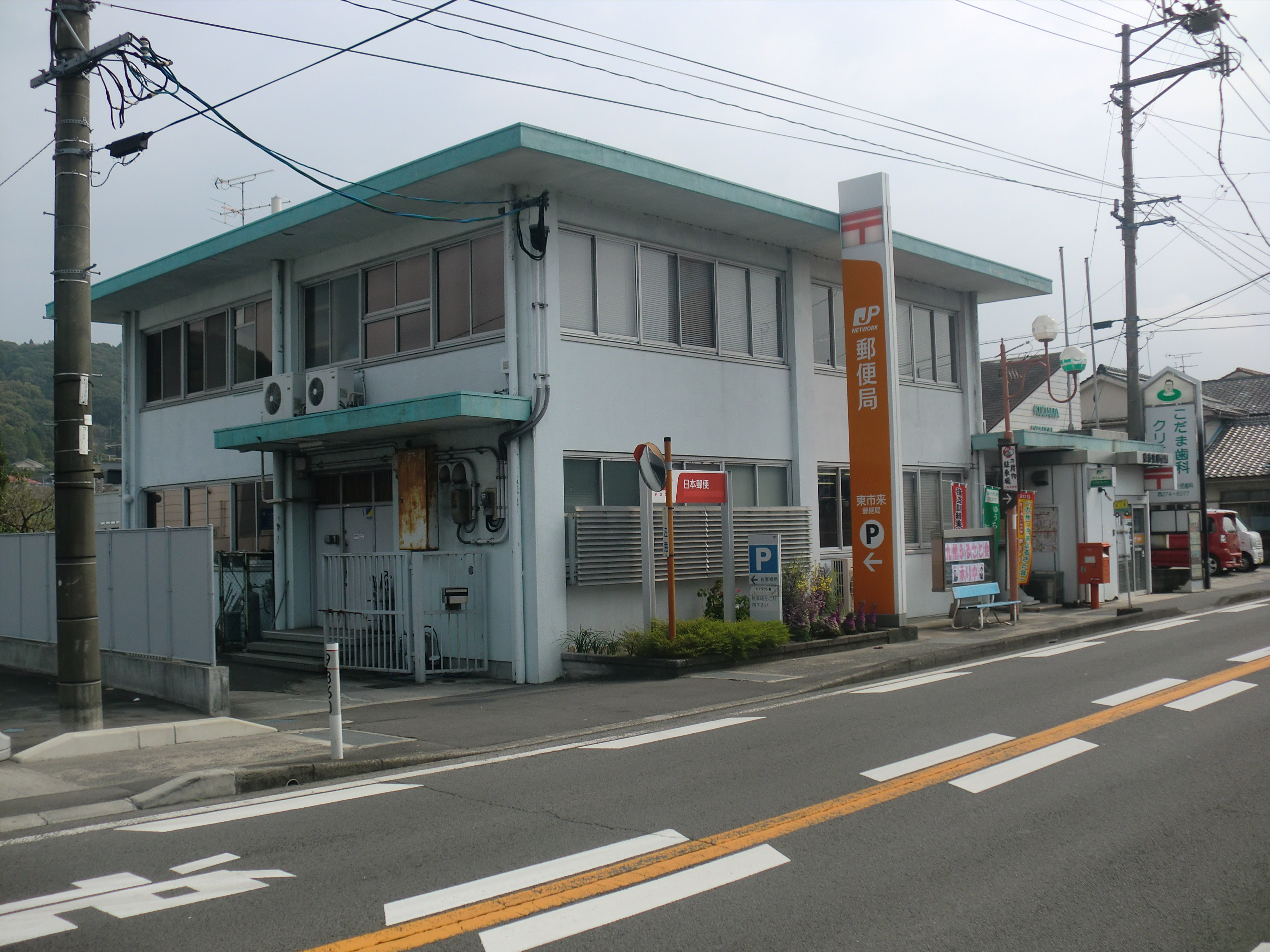 日置市にある東市来（ひがしいちき）郵便局